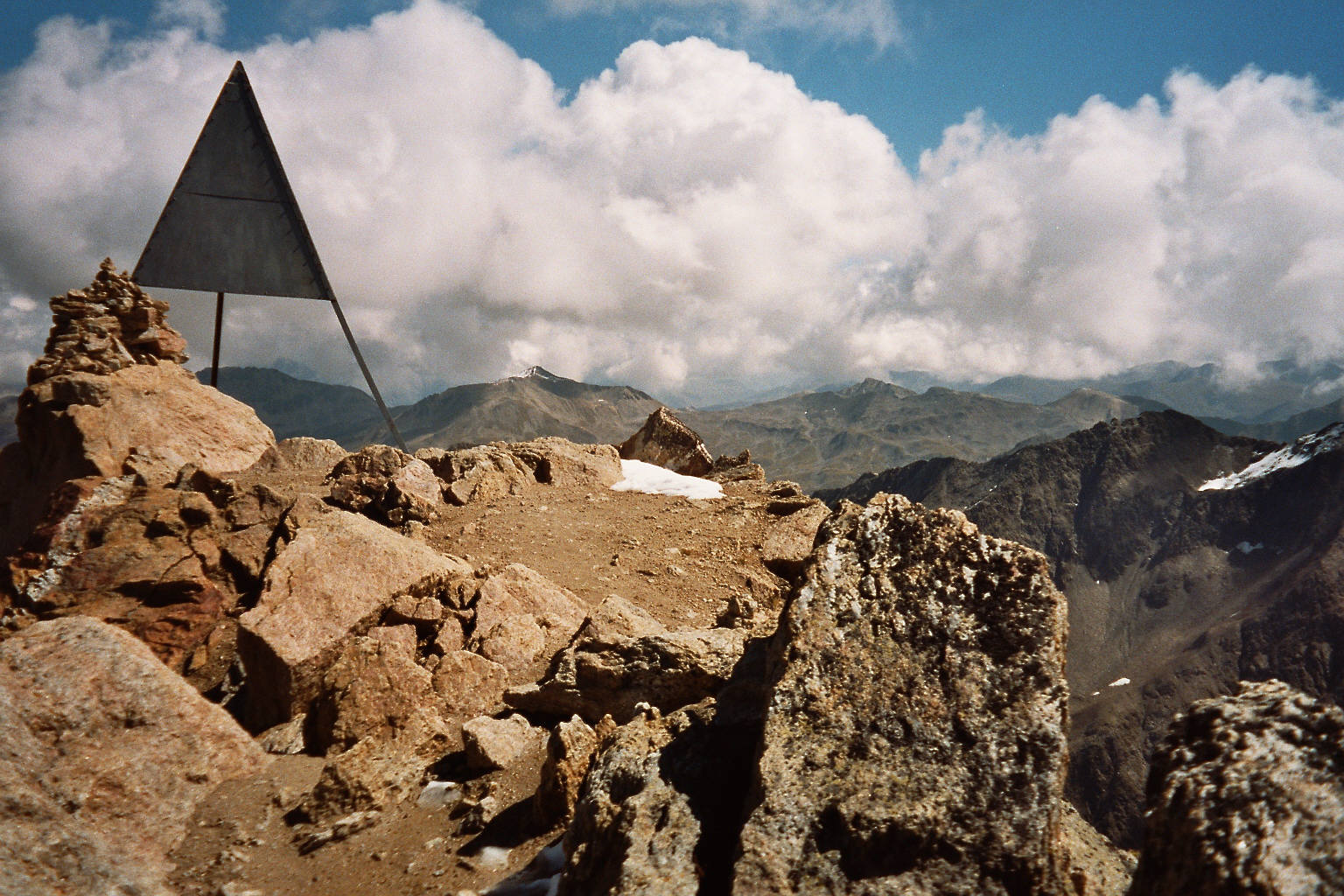 Piz Languard, Gipfel. Blick Richtung Südost.